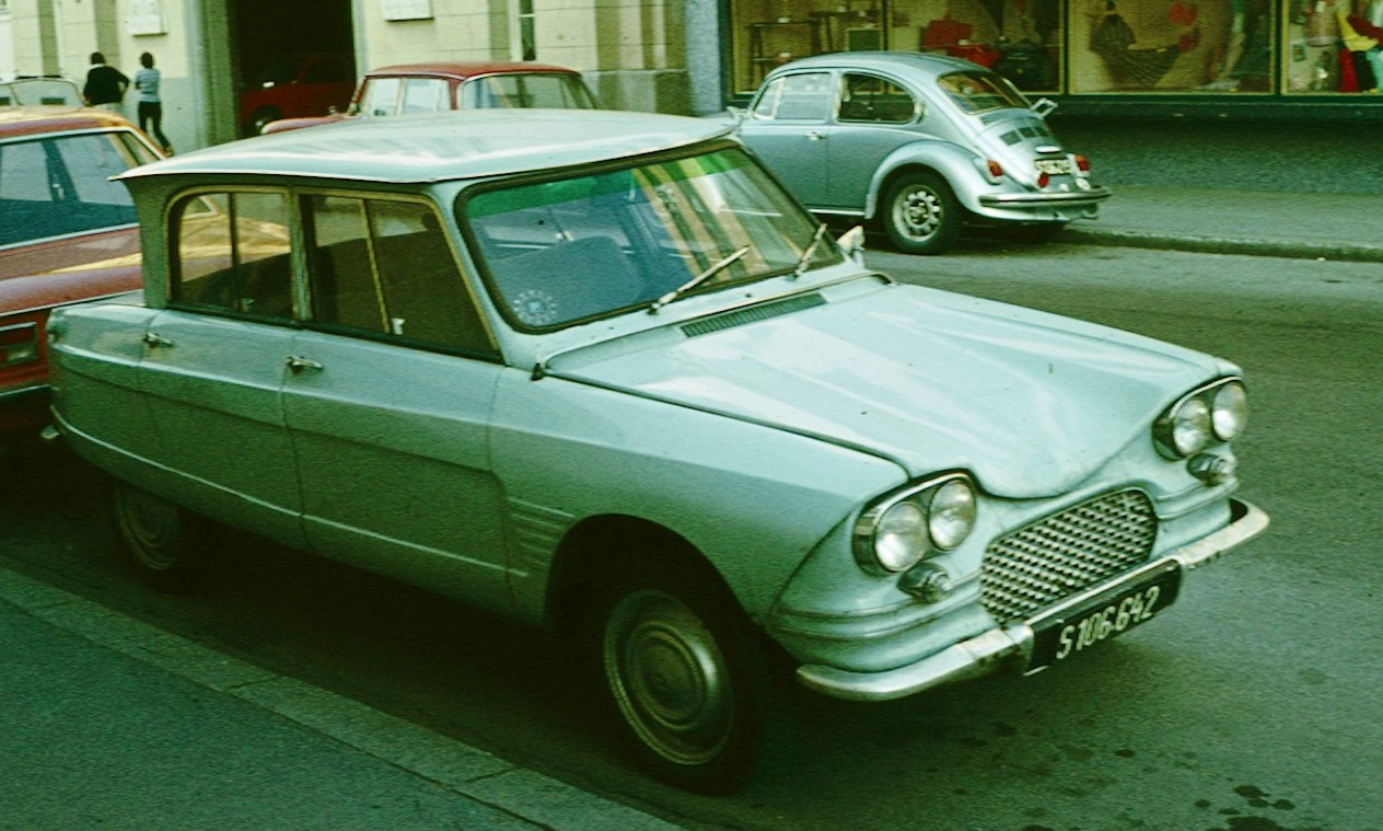 Citroen Ami en Autriche avec Volkswagen K70 en rouge